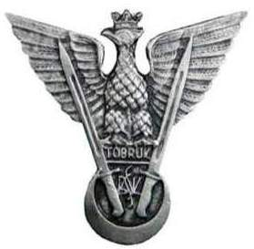 Odznaka pamiątkowa Samodzielnej Brygady Strzelców Karpackich z białego metalu (orzeł w koronie z rozpostartymi skrzydłami, dwoma bagnetami skierowanymi ku górze i napisem Tobruk)